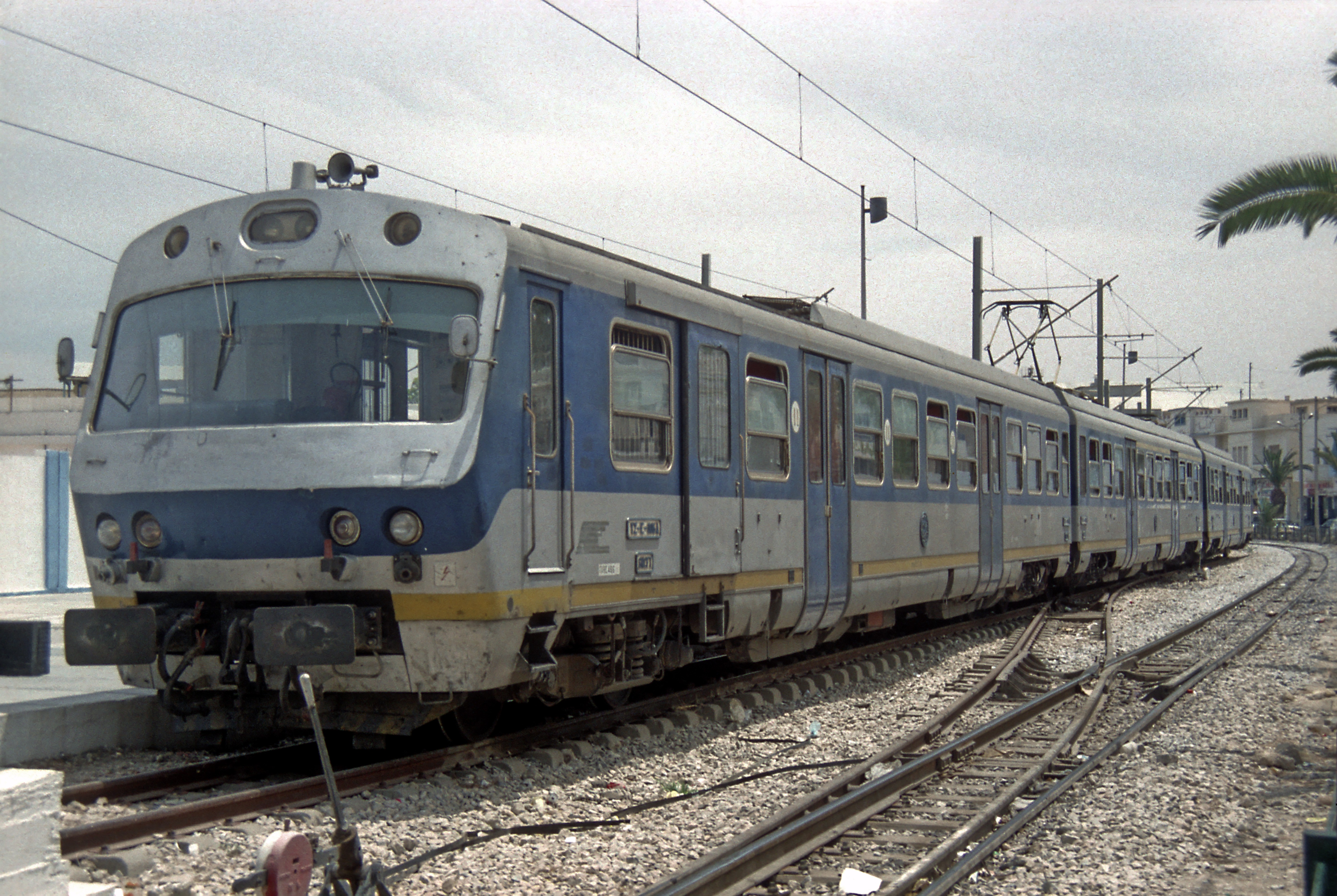 Ganz-Elektrotriebzug für die Meterspurstrecke Sousse–Monastir–Mahdia. Der Mittelwagen ist der Triebwagen, der auch die Hochspannungsausrüstung enthält, die Achsfolge ist damit 2’2’+Bo’Bo’+2’2’. Sehr ähnliche Triebwagen gibt es regelspurig in Bosnien und Kroatien (Reihen 411 bzw 6111).Das fahrleitungslose Gleis im Vordergrund ist das Streckengleis Tunis–Sfax.